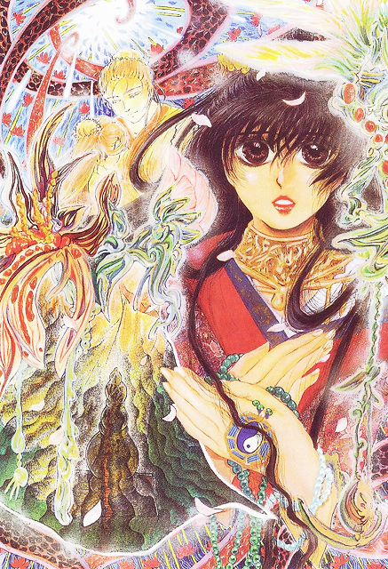 東陽子のカラー作品の一つ(flickr)